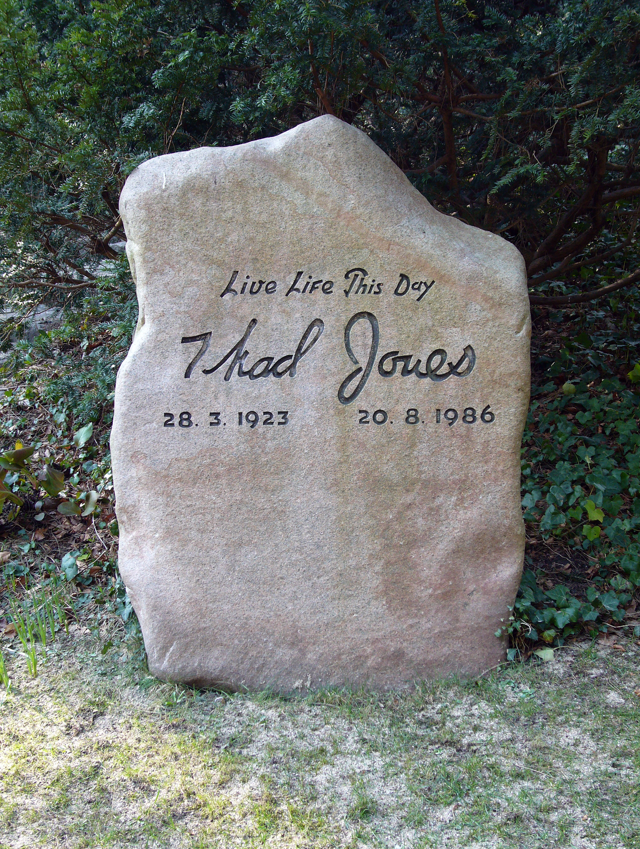 Vestre Kirkegård, Copenhagen, Denmark. Thad Jones' headstone